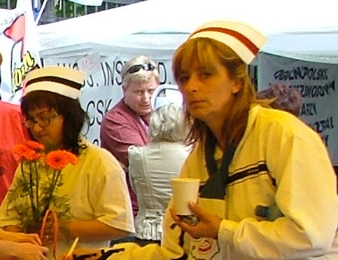 PL, Warsaw, Poland, Al. Ujazdowskie, Protest pielęgniarek pod Kancelarią Prezesa Rady Ministrów w Warszawie